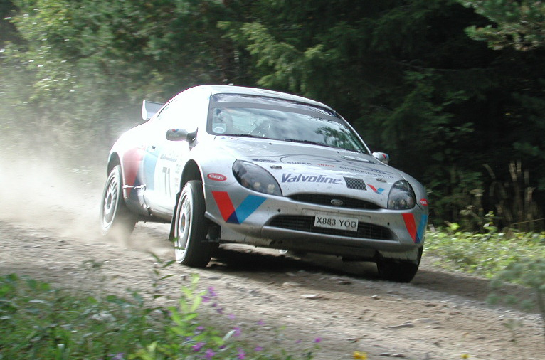 World Rally Championship WRC Rally Finland 2001 - François Duval